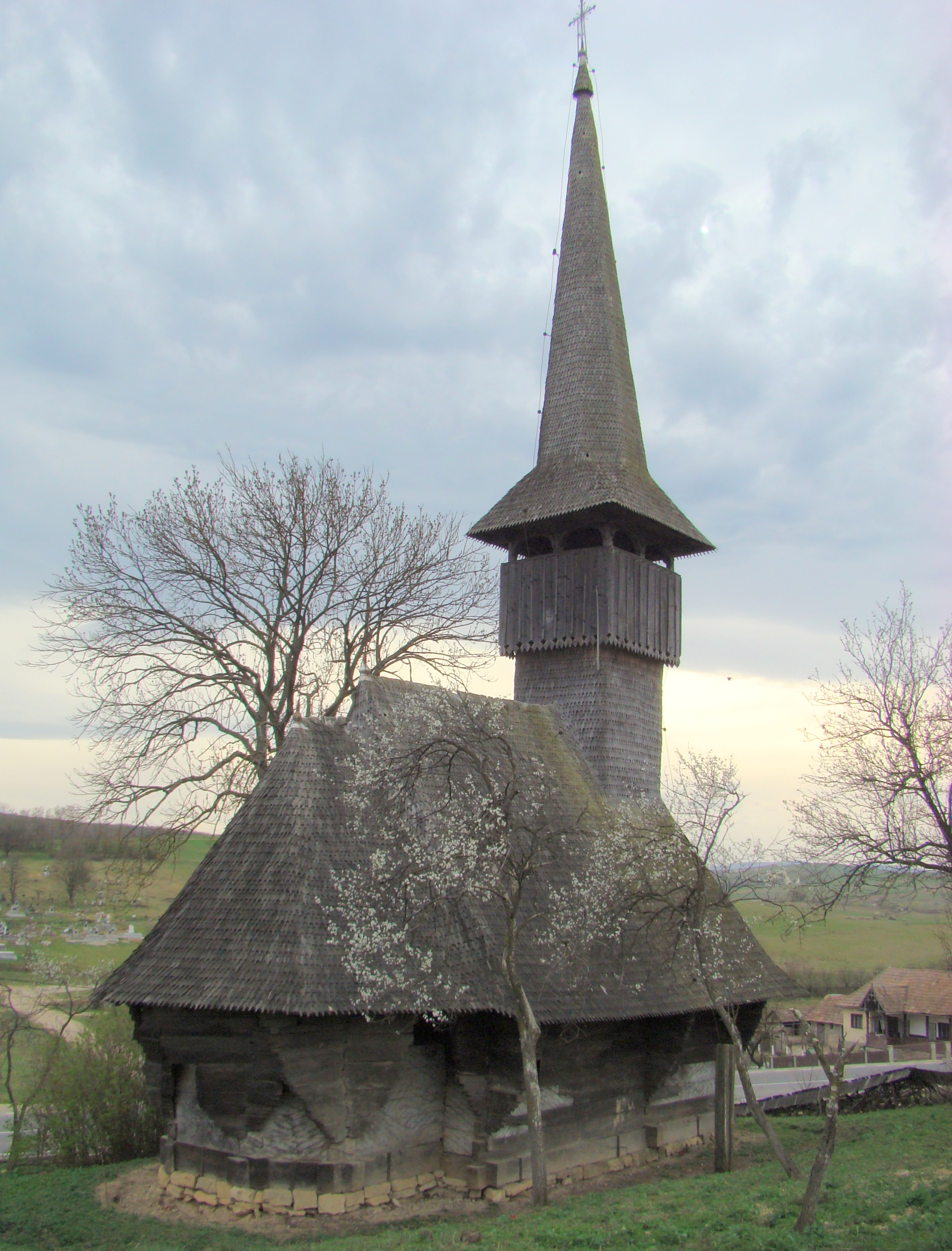 Biserica de lemn „Sfinţii Arhangheli Mihail și Gavriil" din Poarta Sălajului, comuna Românaşi, judeţul Sălaj